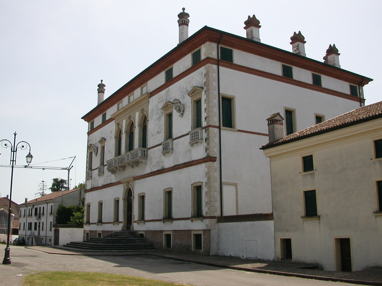 Palazzo Malmignati, Lendinara, Provincia di Rovigo.